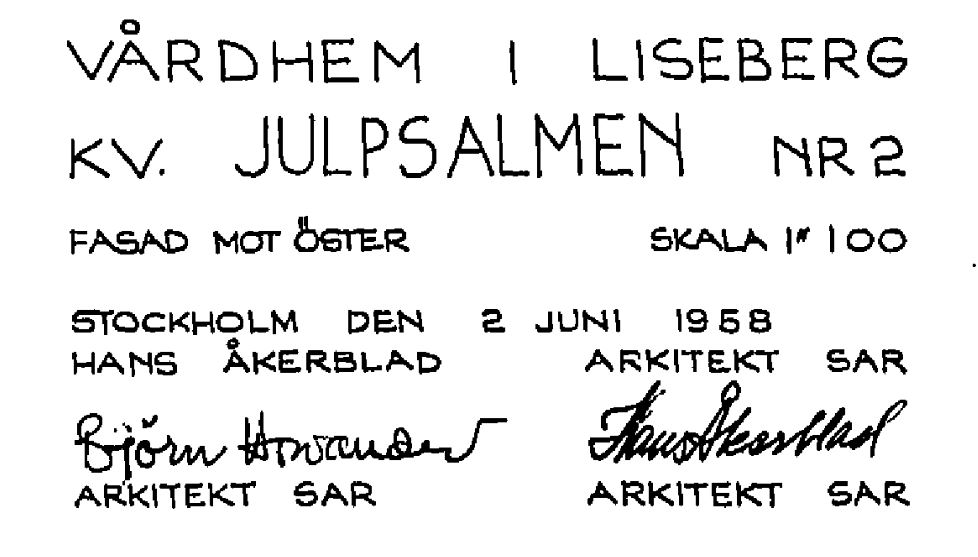 Ritningsstämpel för Vårdhemmet i Liseberg